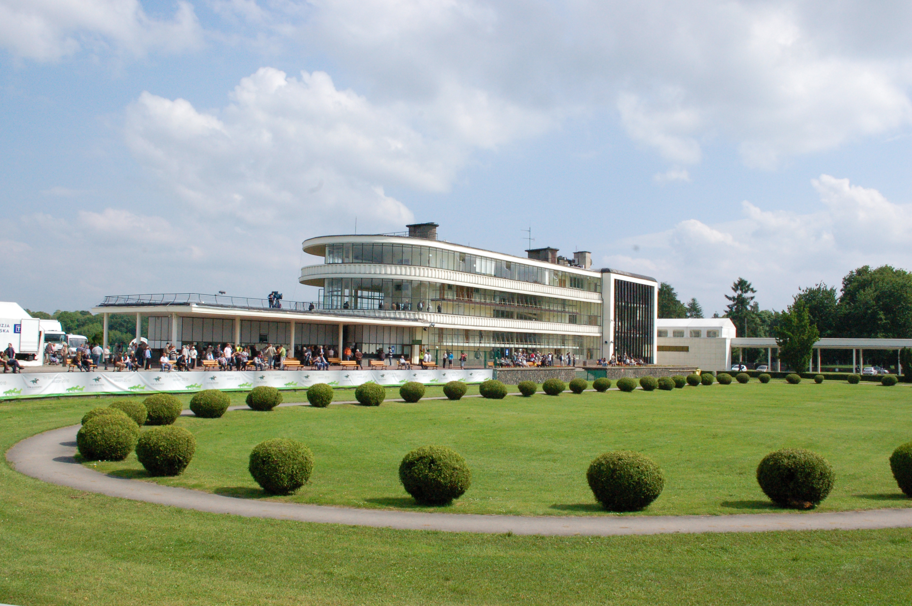 Pferderennbahn Ursynow, Warschau, neueres Tribunengebäude